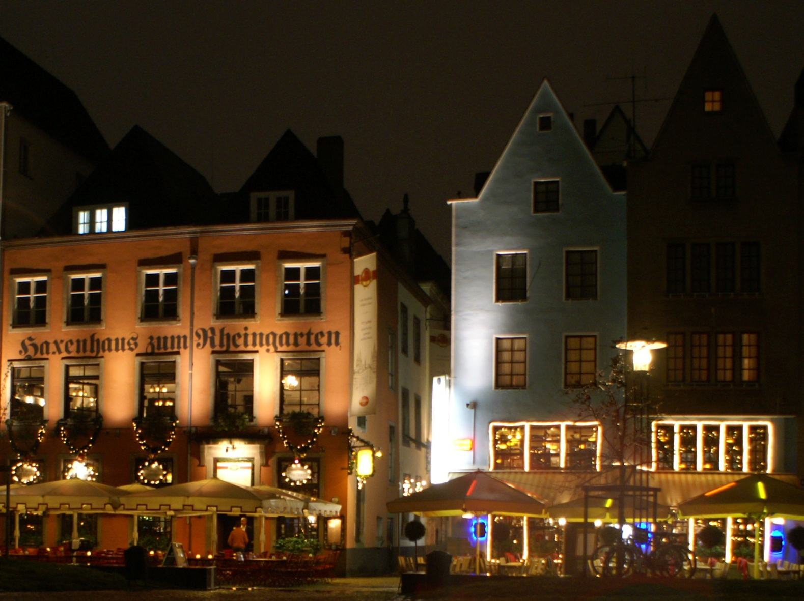 Das Haxenhaus am Rheingarten in Köln bei Nacht zur Weihnachtszeit 2010.